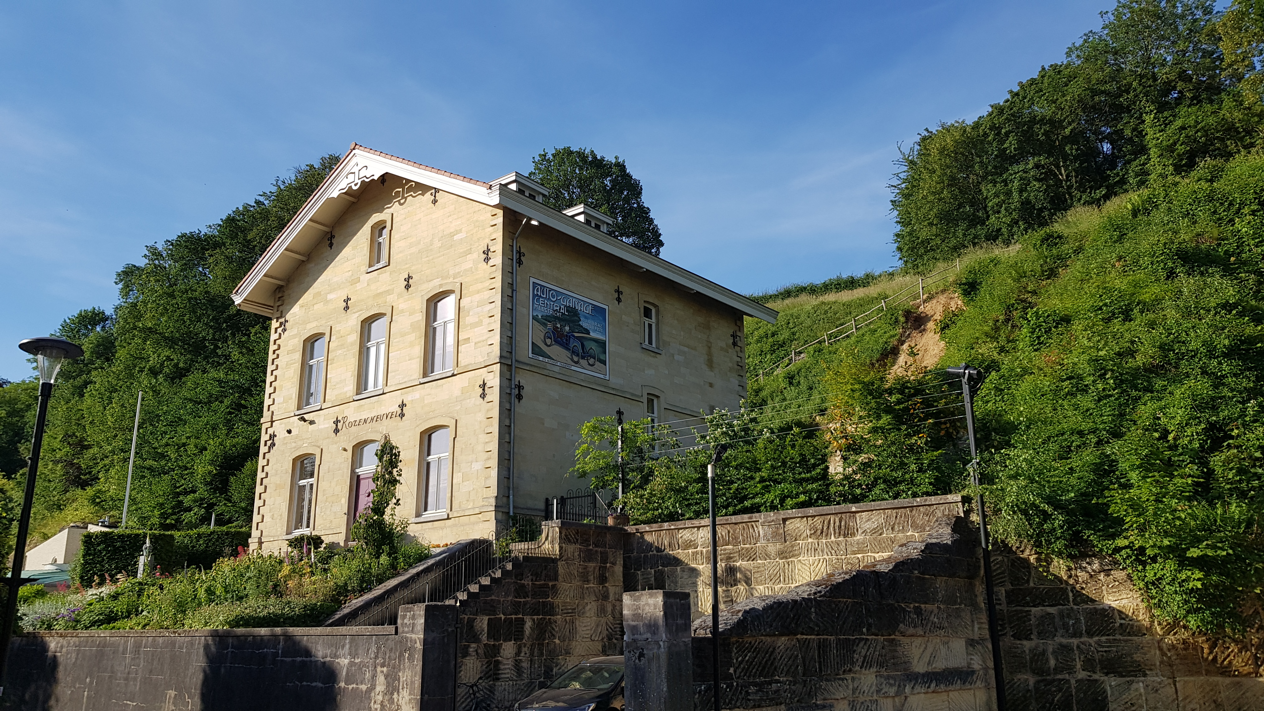 Villa Rozenheuvel, Valkenburg aan de Geul, Nederland